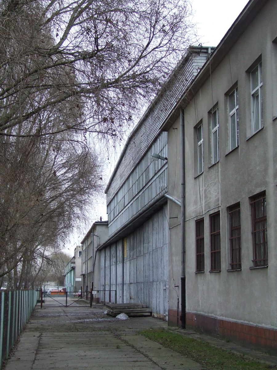 Lotnisko Gocław, hangary, Warszawa, Poland